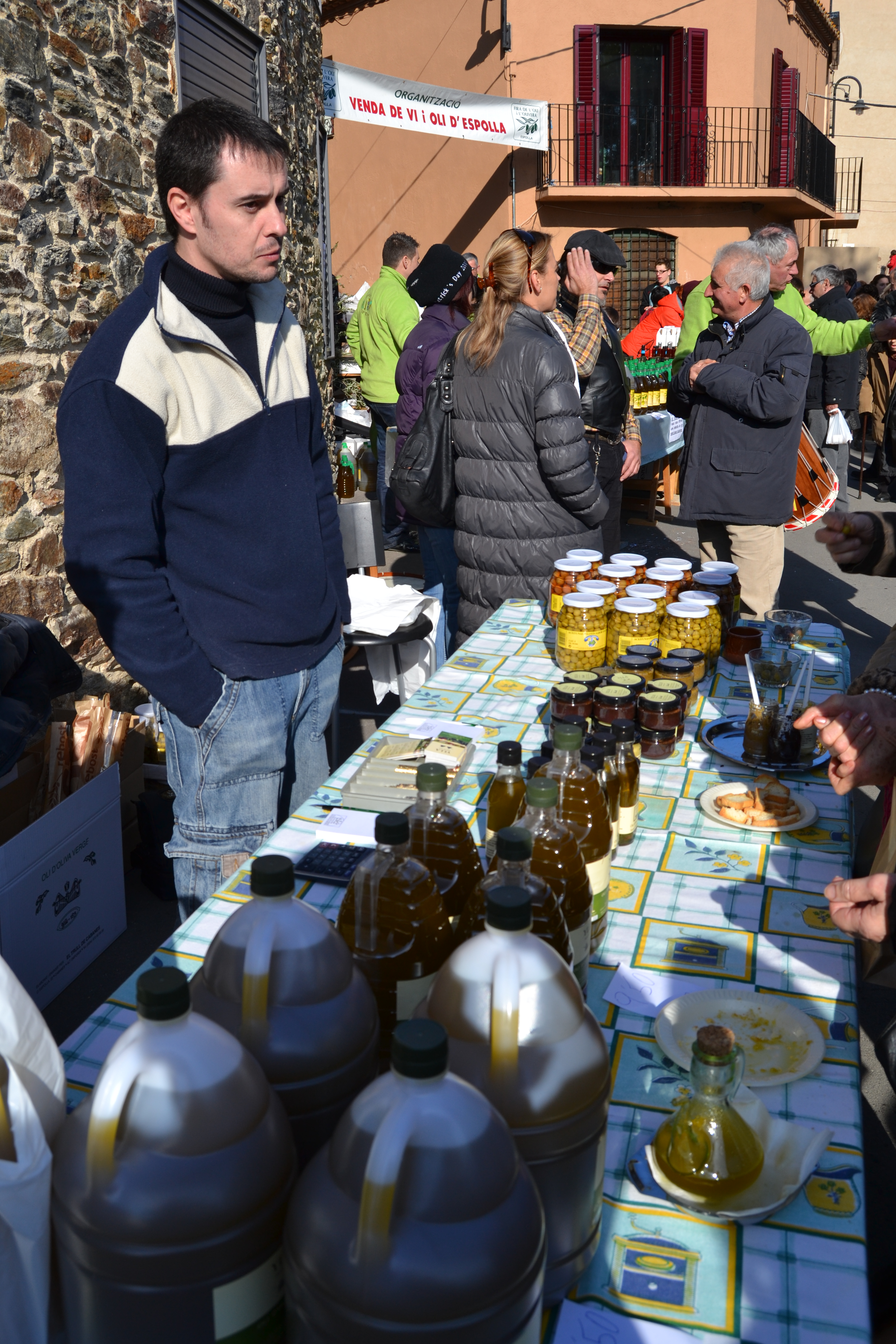 Fira de l'oli i l'olivera a Espolla, Alt Empordà, Catalunya, Espanya